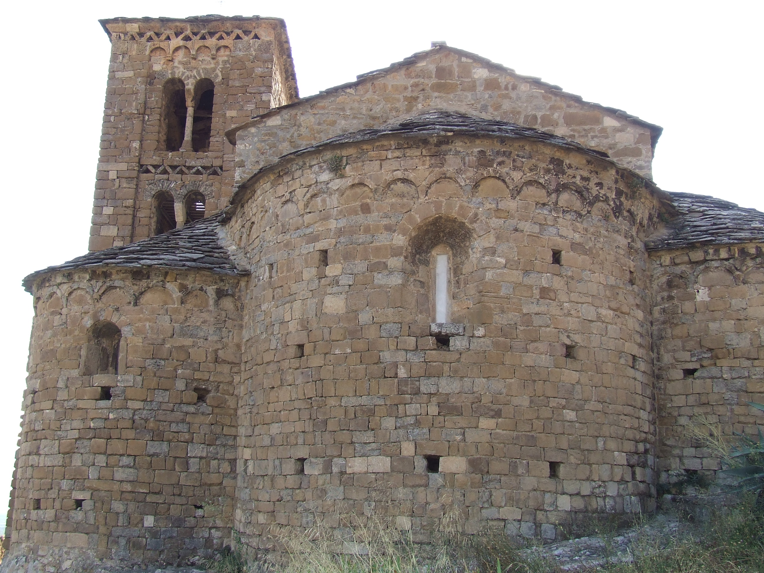 Capçalera i campanar de Sant Esteve d'Abella de la Conca.